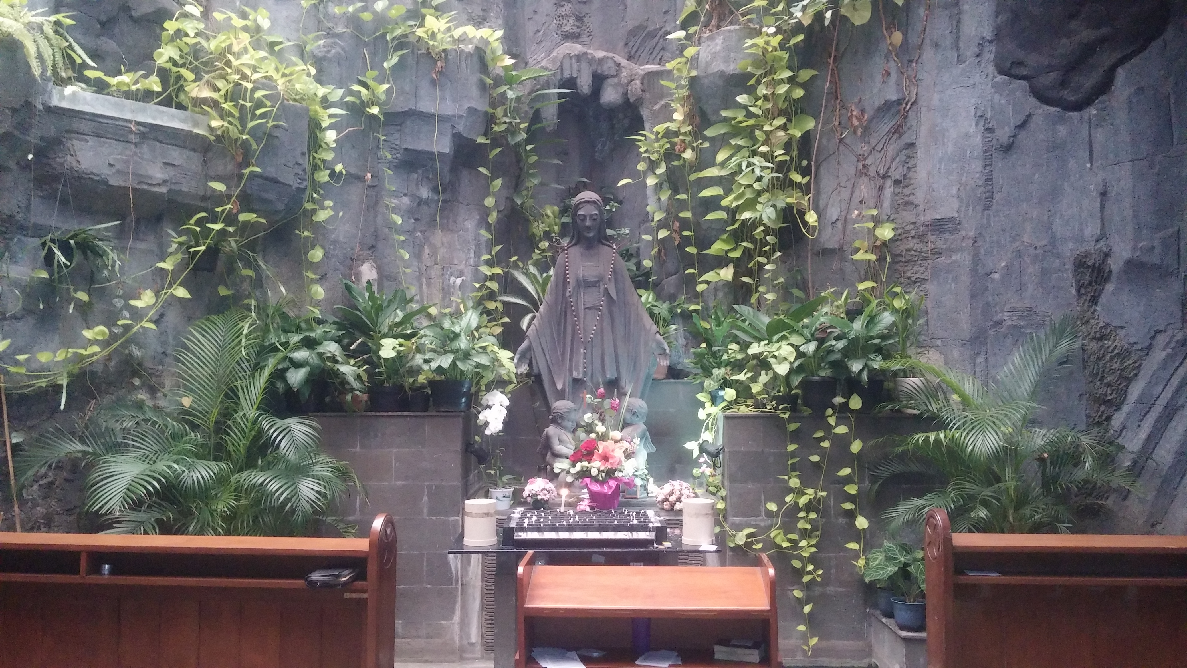 Gua Maria Gereja Santa